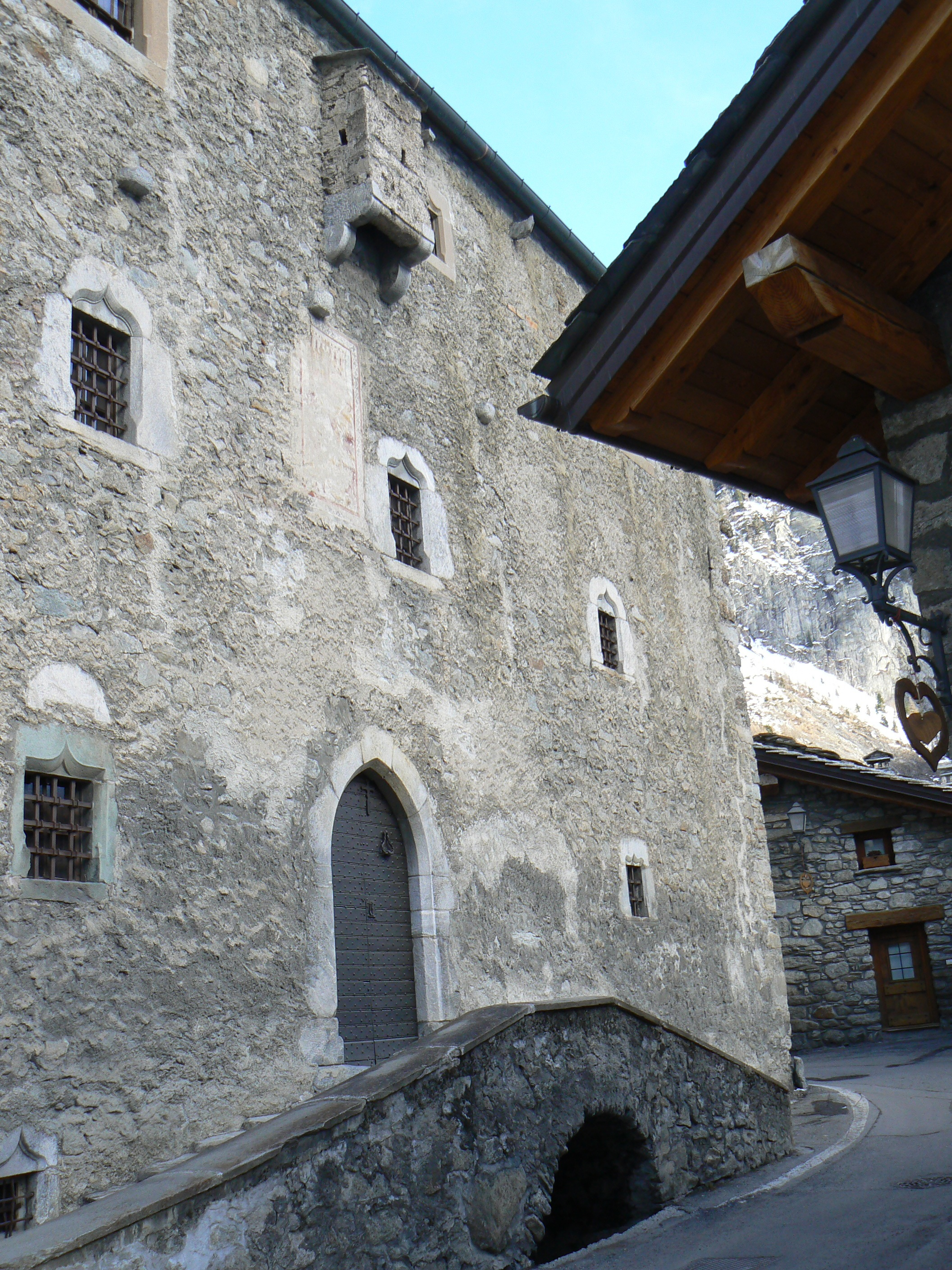 Casaforte Passerin d'Entrèves, Courmayeur, Valle d'Aosta, Italia.